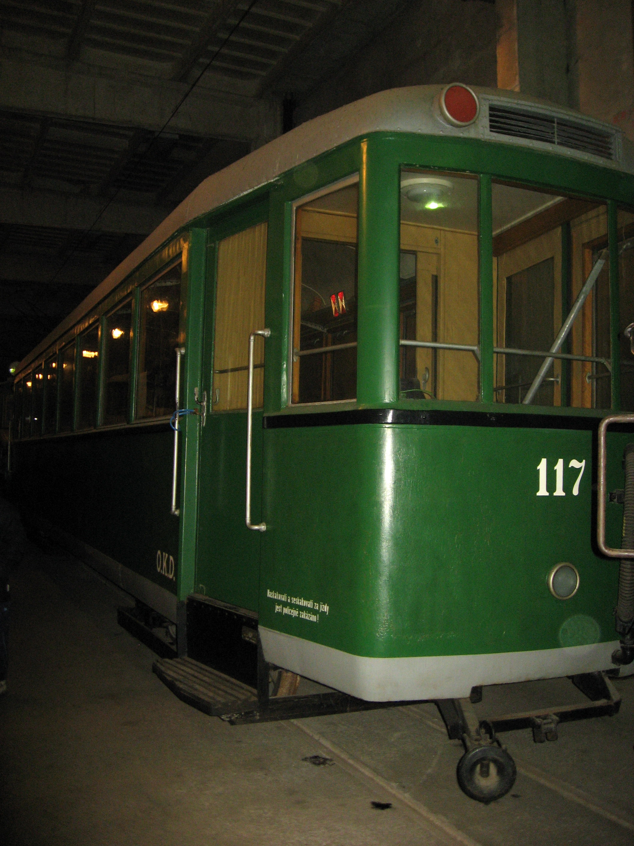 Vlečný vůz Místní dráhy Ostrava – Karviná ev. č. 117, rok výroby 1948, výrobce Studénka – exponát Technického muzea v Brně, depozitář MHD v Líšni